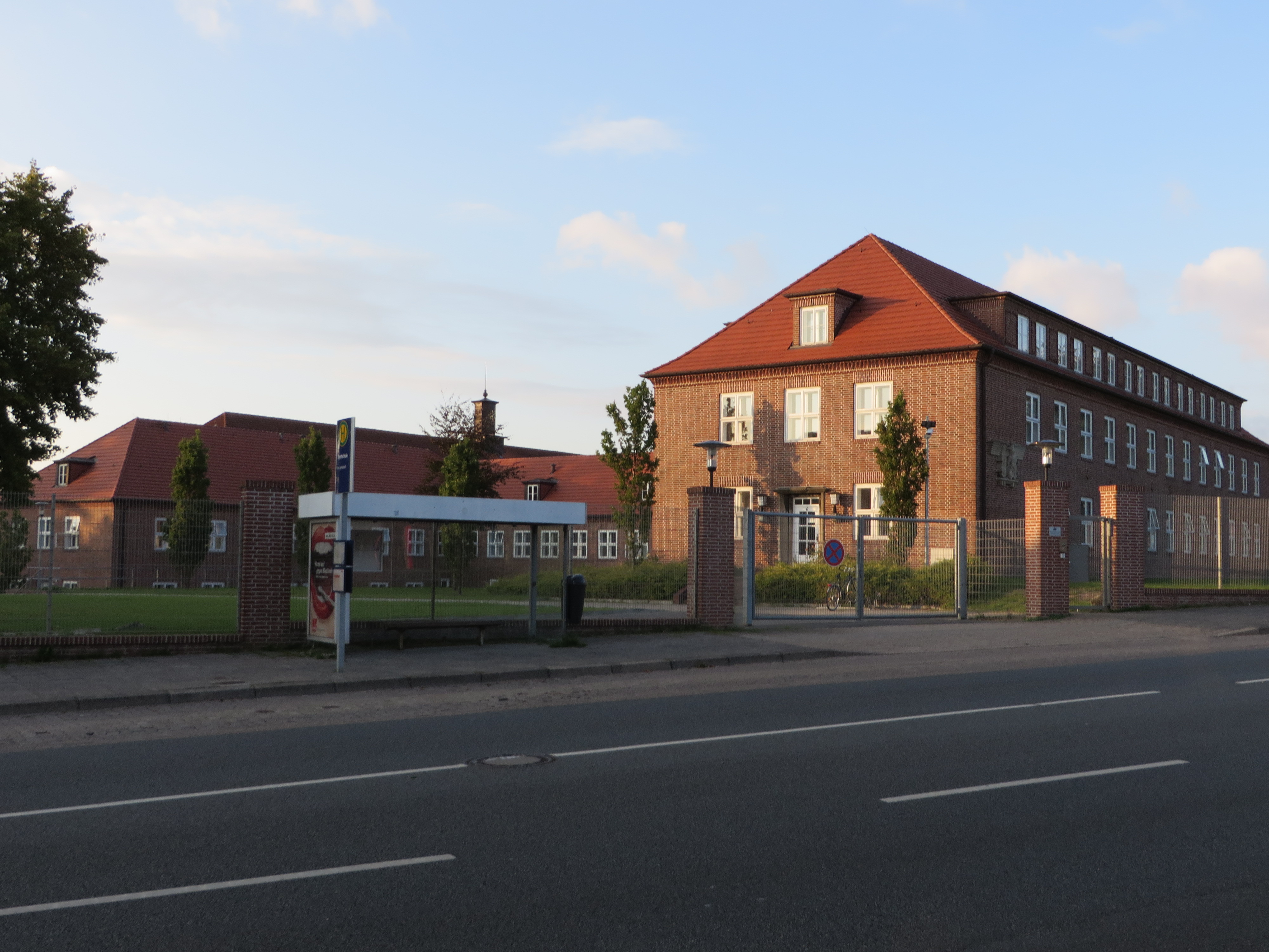 Die Sportschule Flensburg-Mürwik (September 2014)